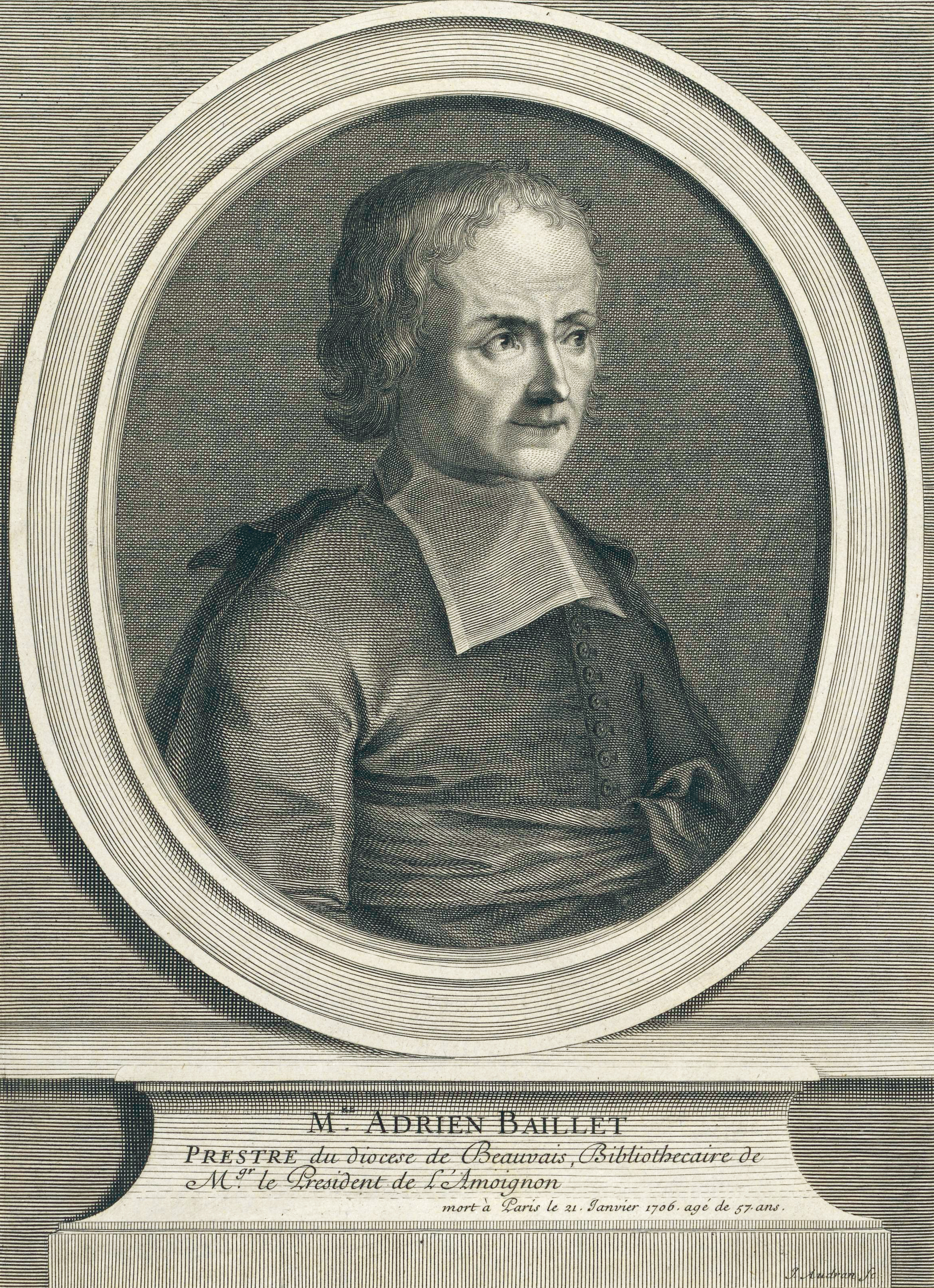 Portrait gravé d'Adrien Baillet